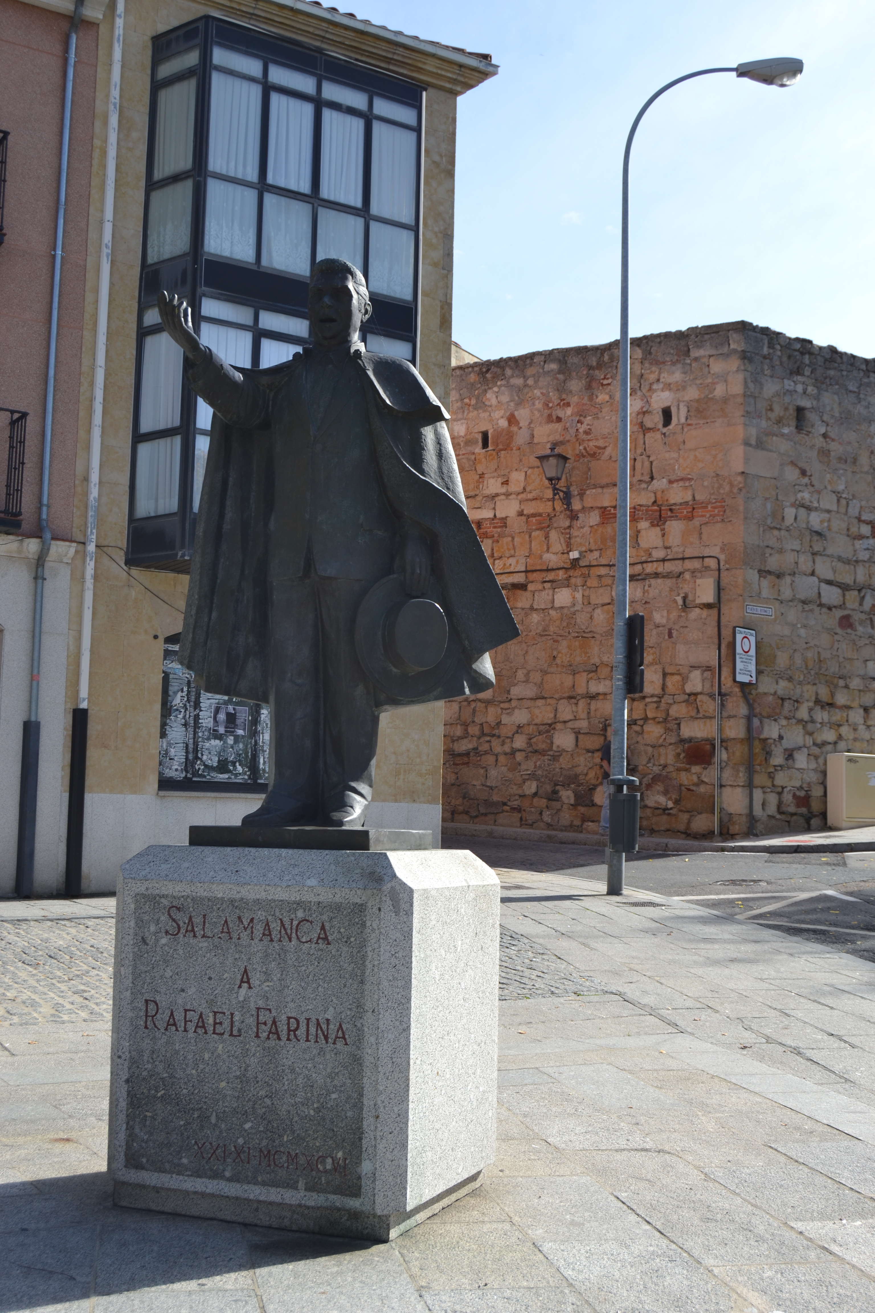 Salamanca, Castilla y León, España. Octubre de 2016.